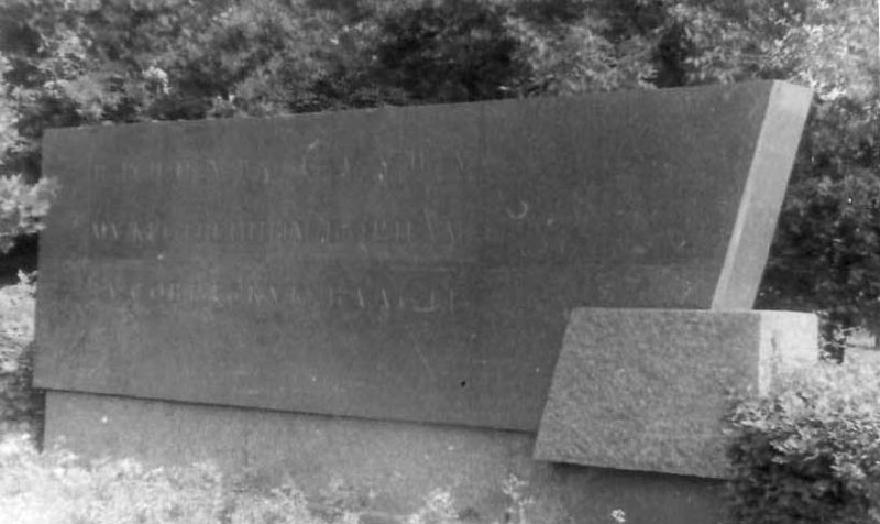 Памятник борцам за советскую власть (ныне памятник журналистам) в Грозном